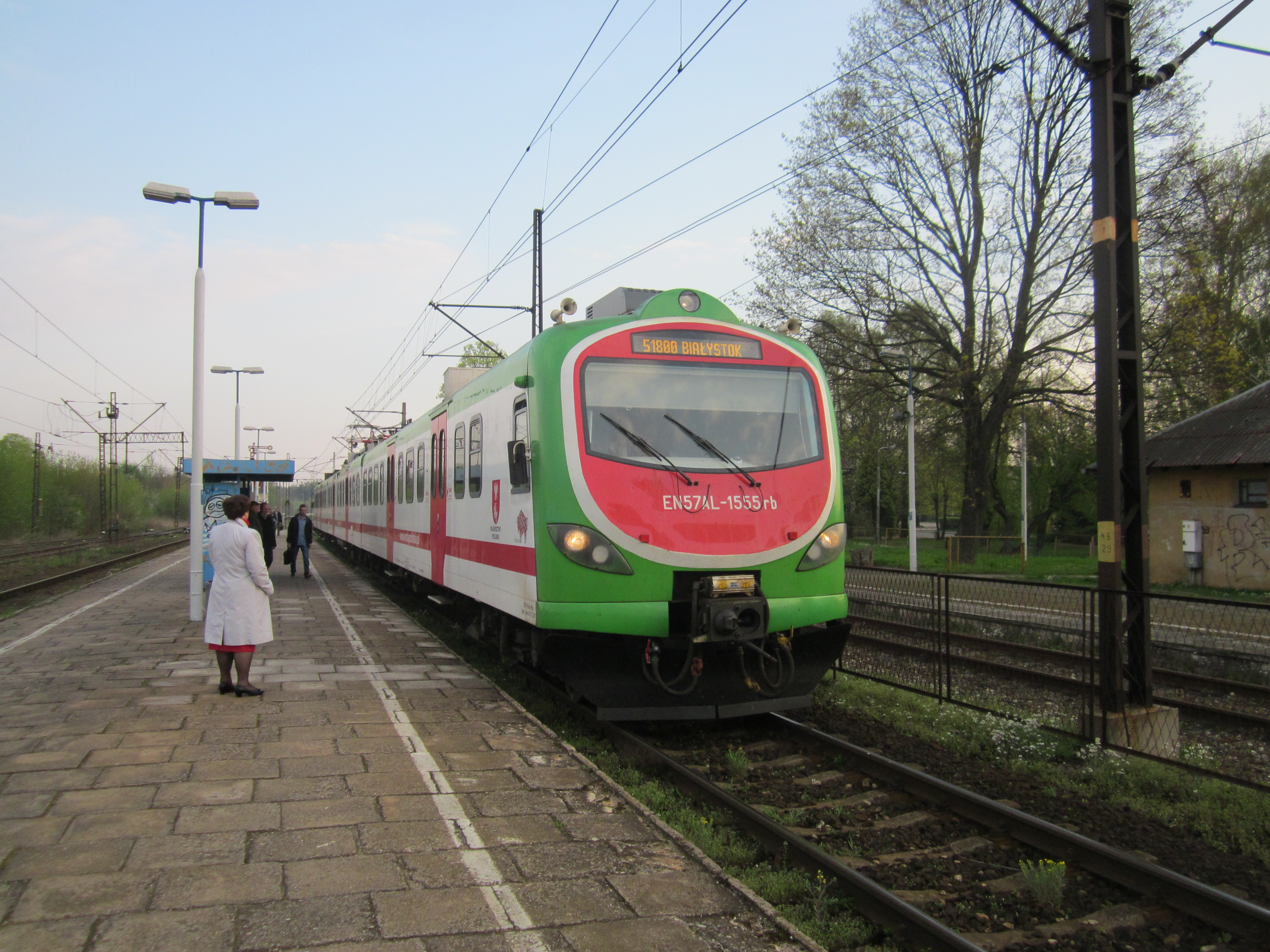 Pociąg z napędem elektrycznym EN57AL - 1555 w Mońkach